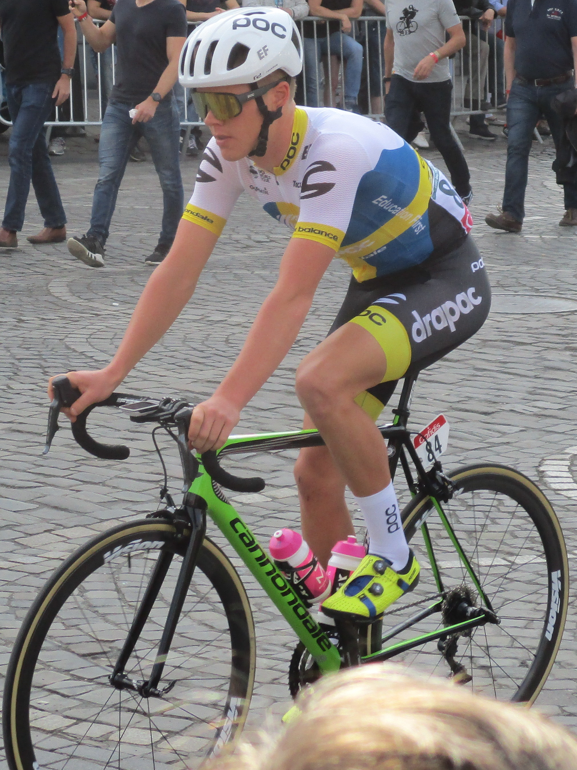 Start van Luik-Bastenaken-Luik 2018 in Luik.